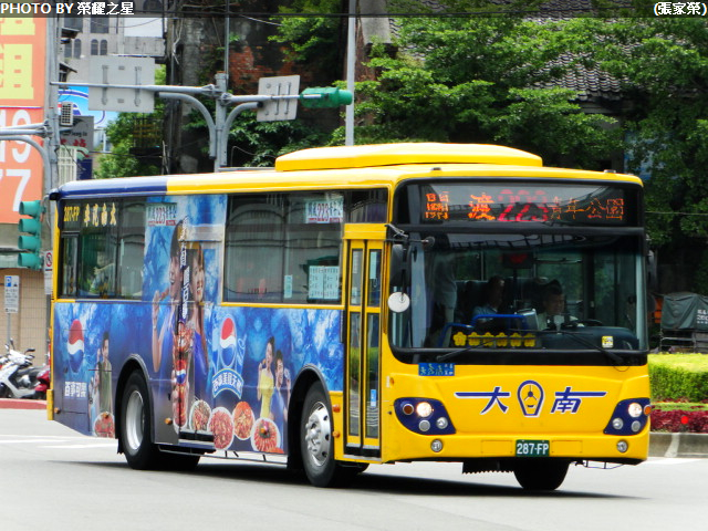 大南汽車223路線.287-FP. DAEWOO-BC211ML(中低底盤) 本車目前調至302路線!